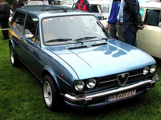 Alfa-Romeo Alfasud Giardiniera (Estate)